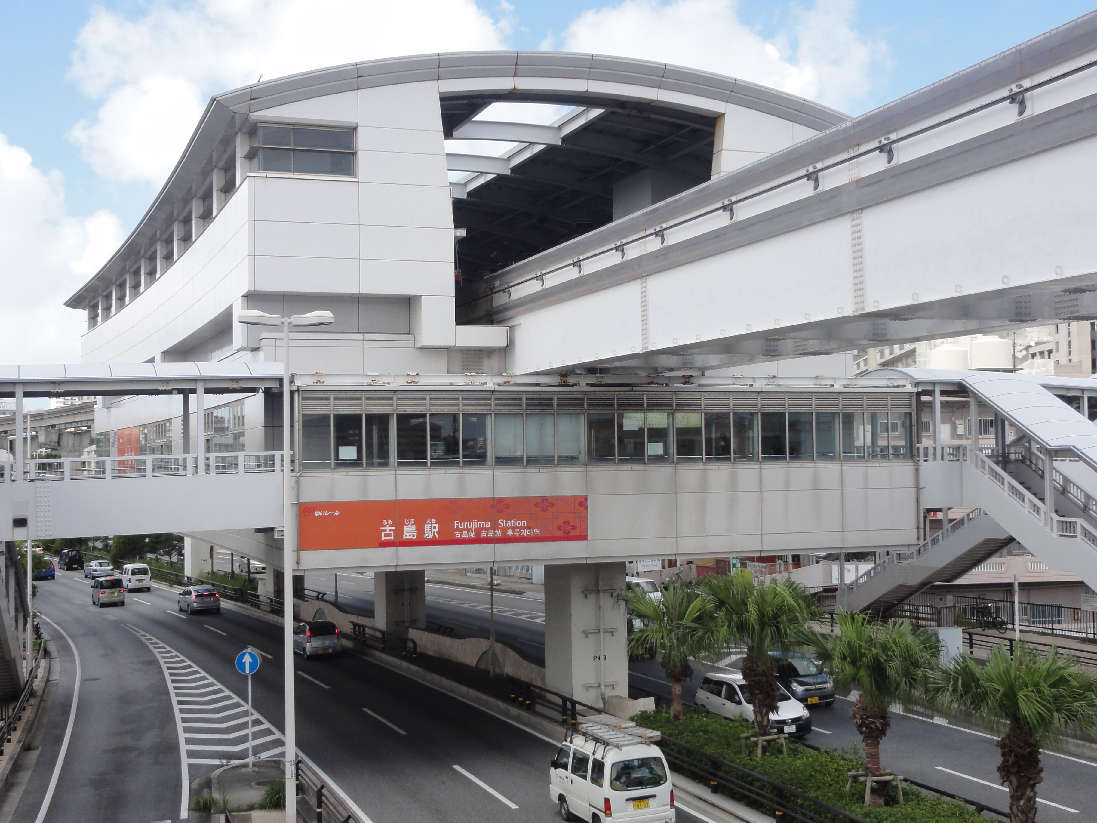 沖縄都市モノレール古島駅